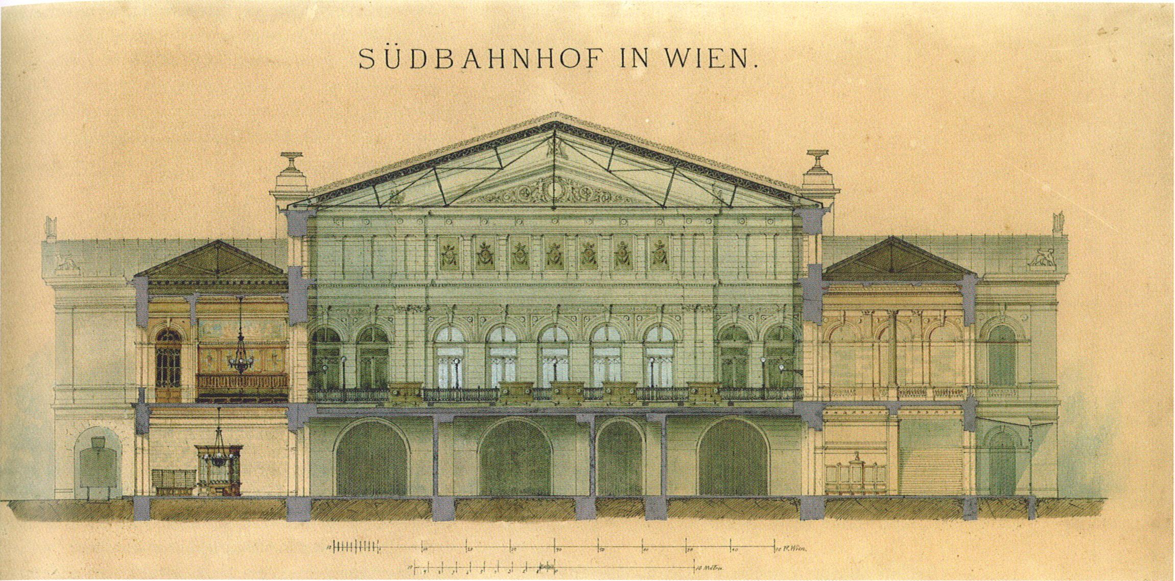 Südbahnhof in Wien, Querschnitt der Bahnhofshalle.